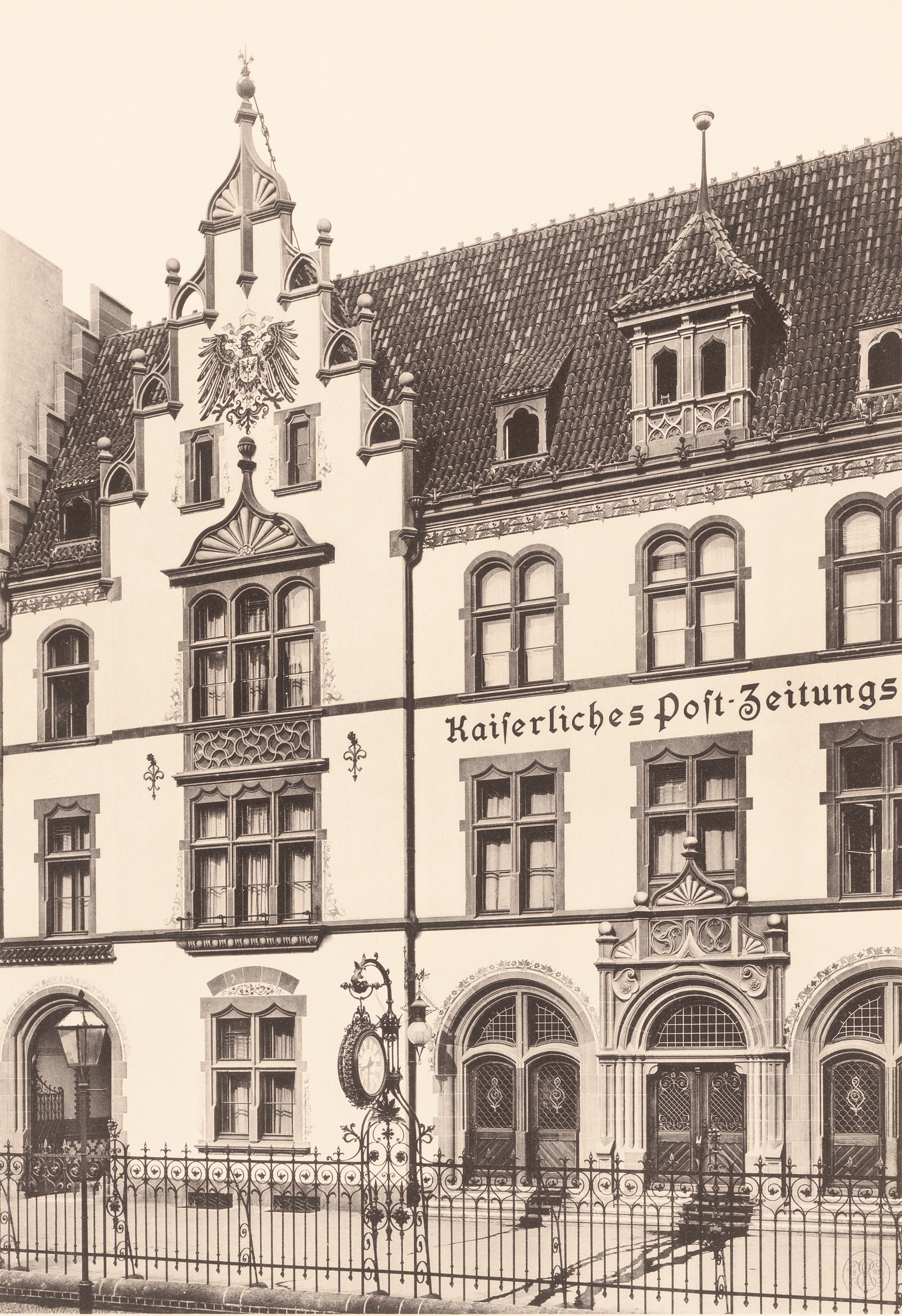 Kaiserliches Post-Zeitungsamt, Berlin, Dessauer Straße 4